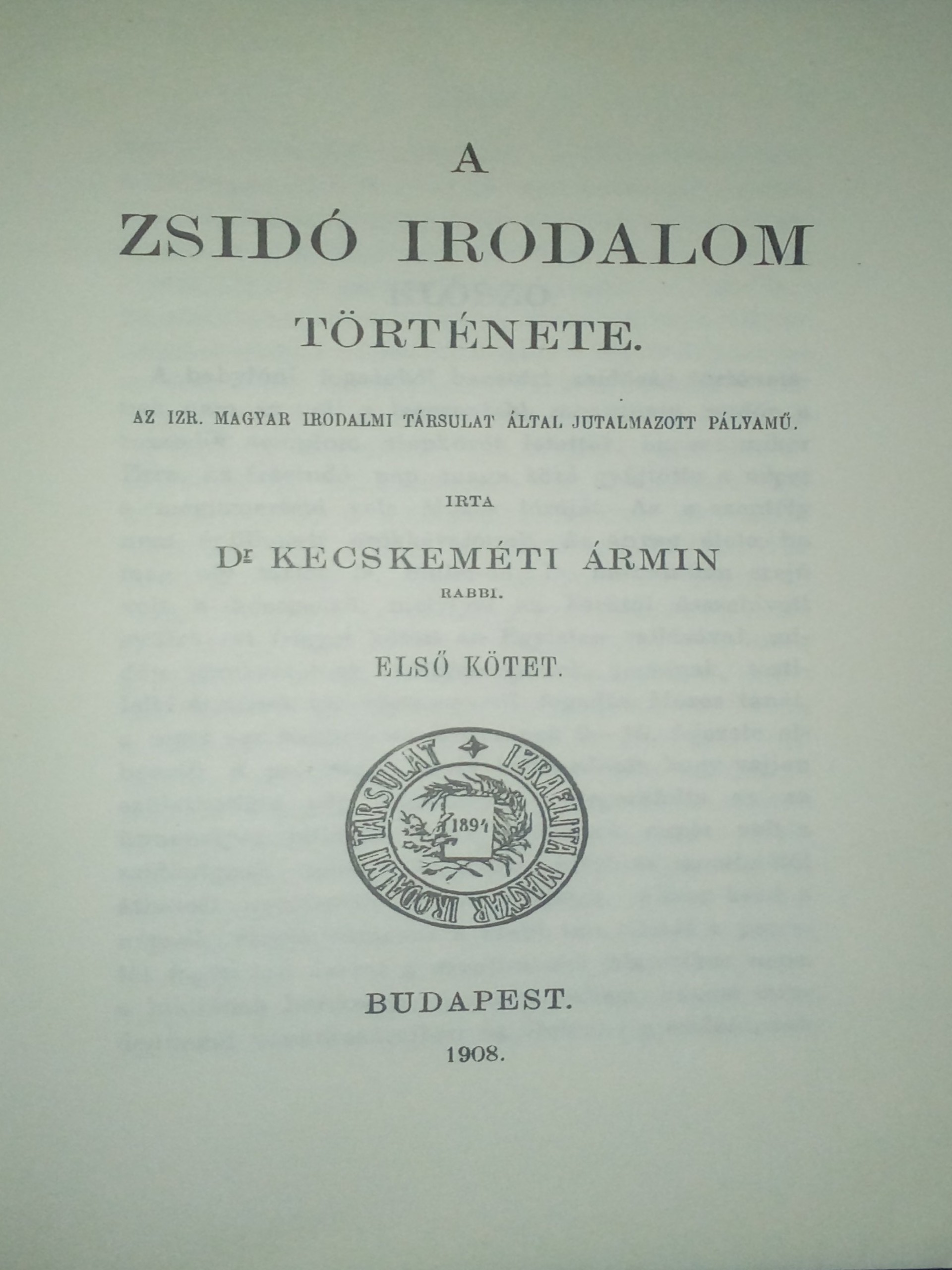 Az adott mű címlapja.